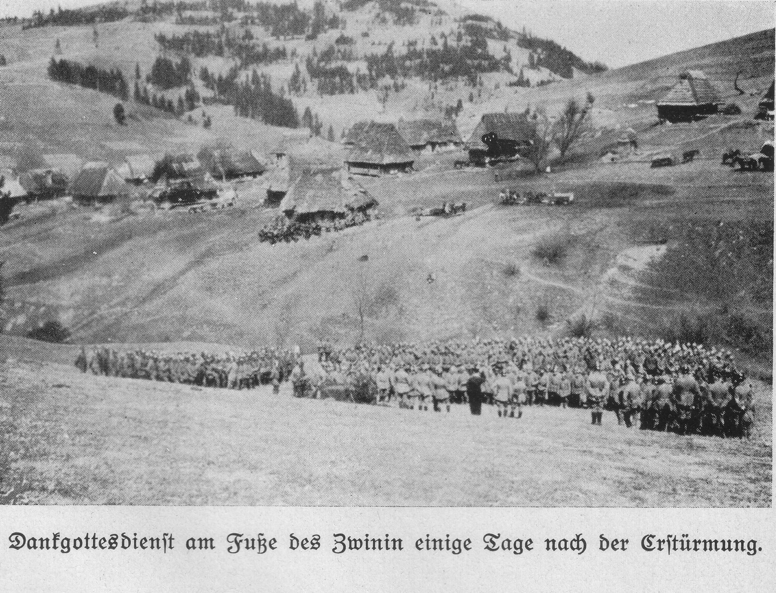 Dankgottesdienst wenige Tage nach der Erstürmung des Zwinins im April 1915